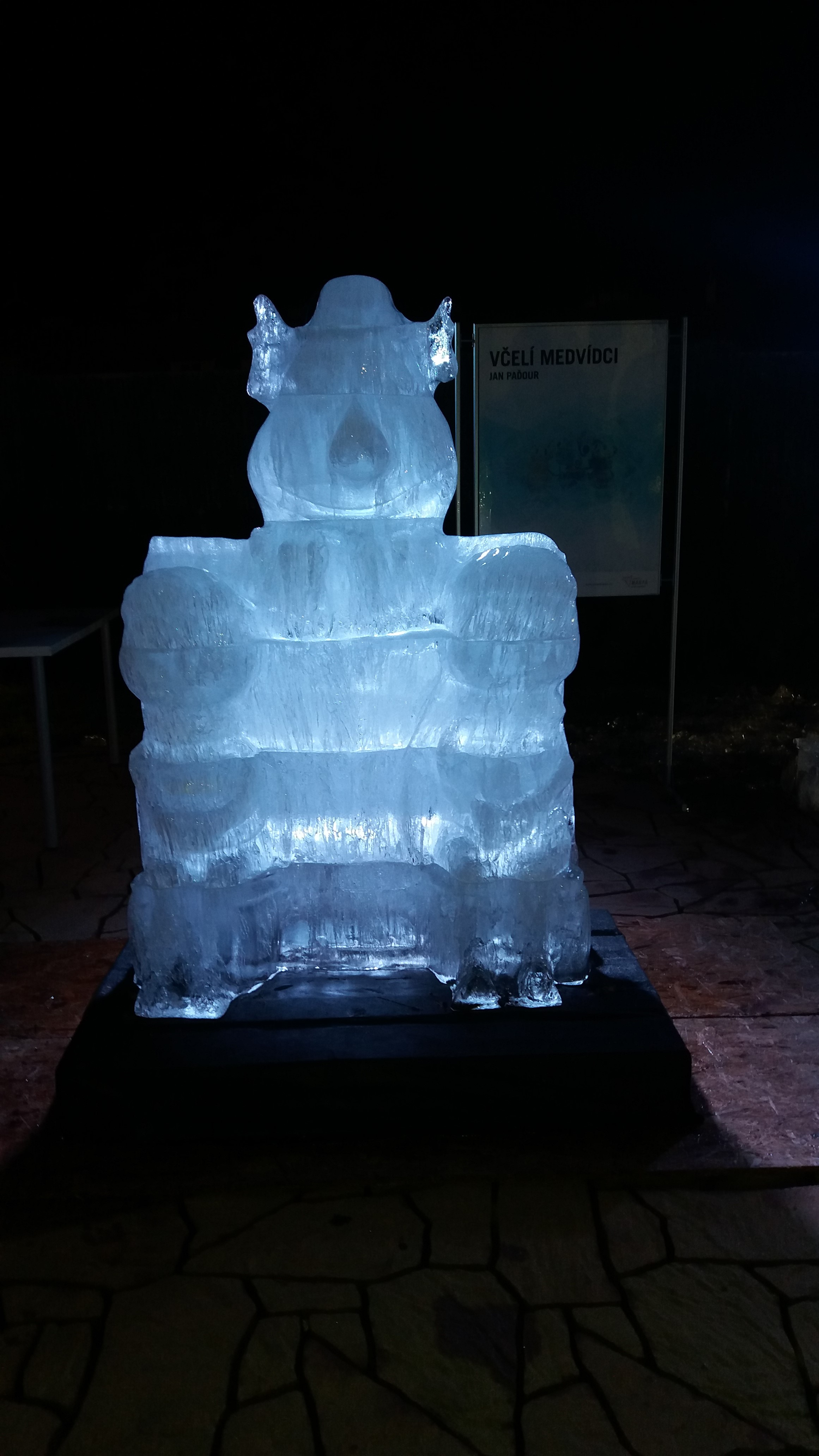 Postavička Pučmelouda z Příběhů včelích medvídků vytvořená z ledu na Festivalu ledových soch na střeše pražského nákupního centra Galerie Harfa.